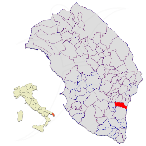 Il comune di Andrano nella provincia di Lecce